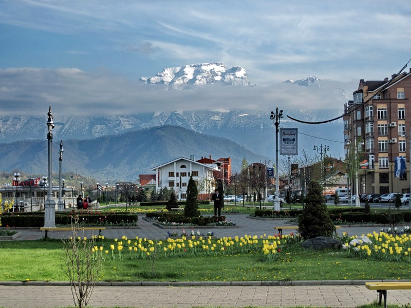 Vido de Stolovaja monto (3008 m) el Vladikavkaz